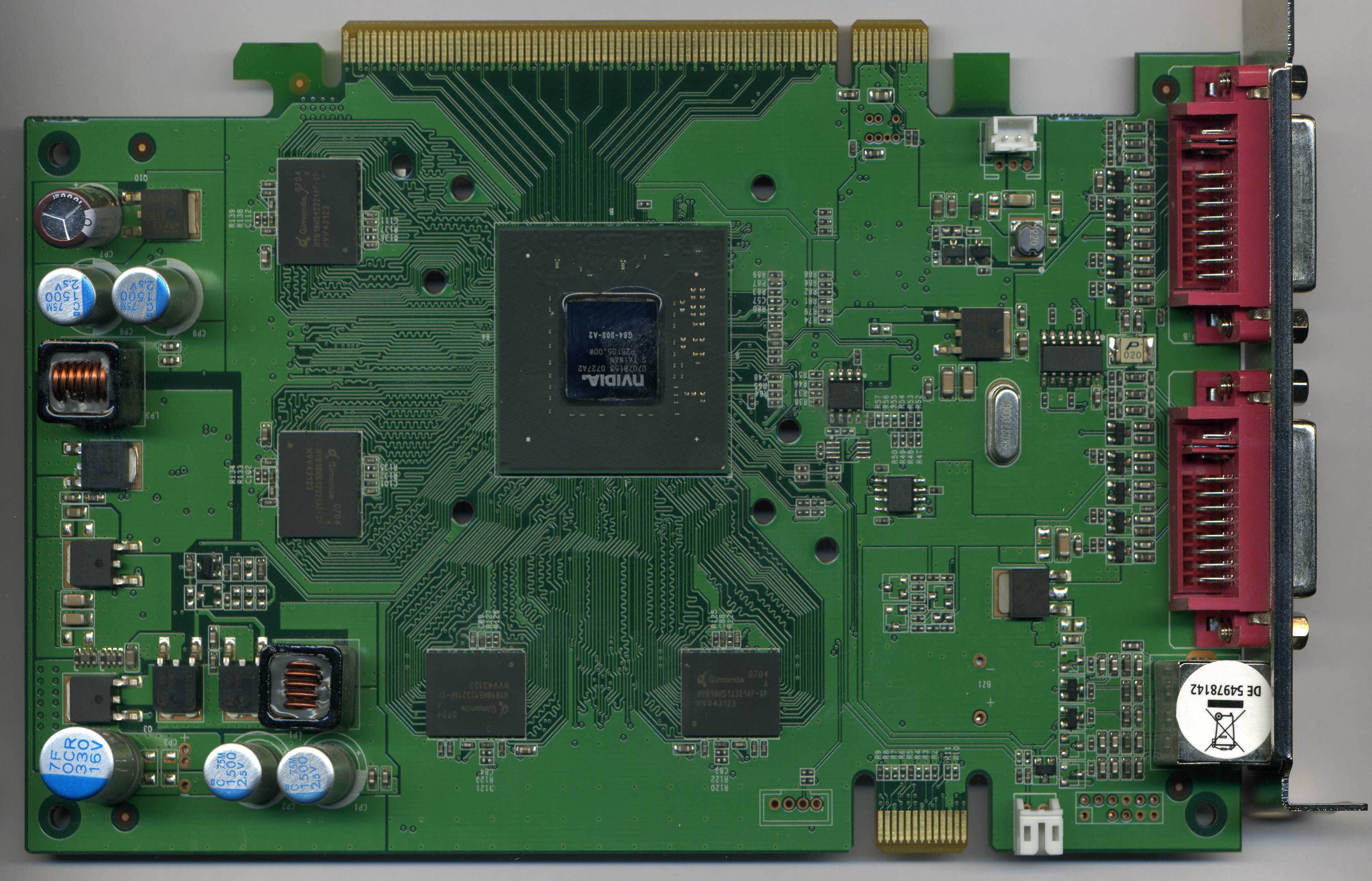 geForce 8600 GT